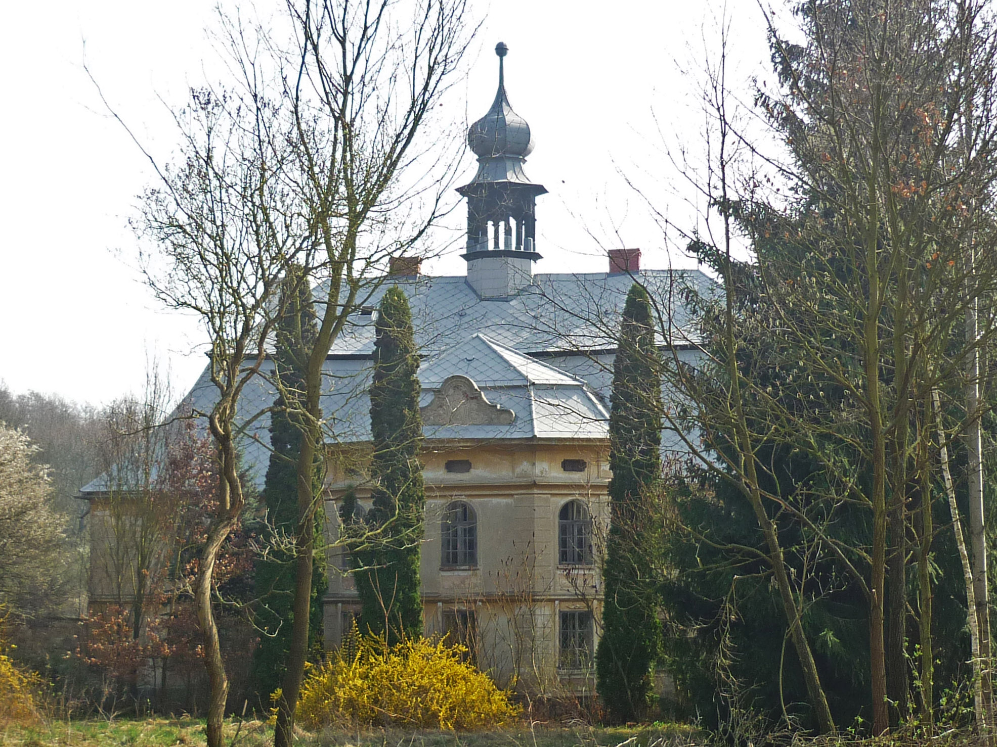 Schloss in Stankowitz bei Saaz (Staňkovice, Okres Louny)